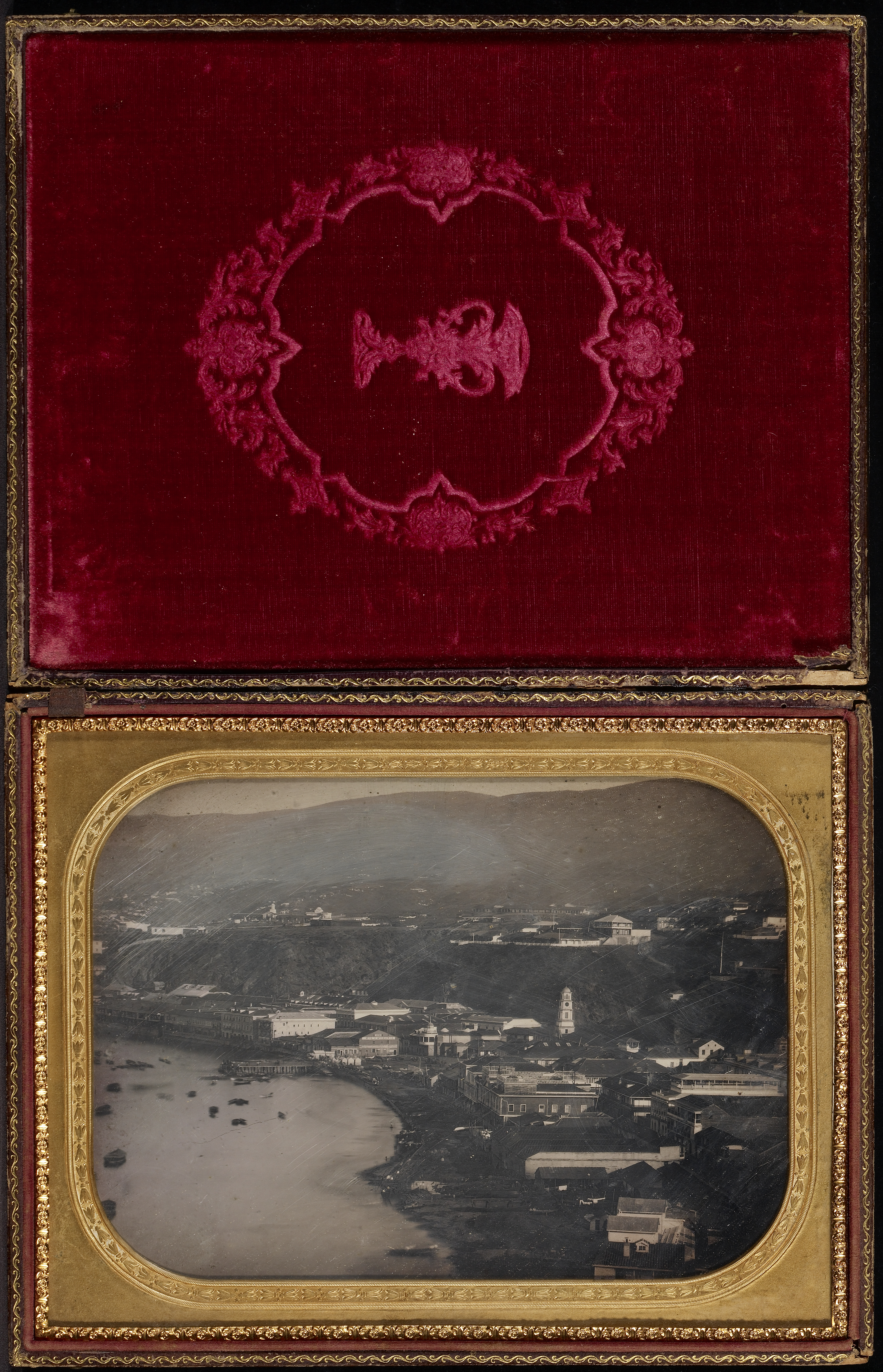 En el Invierno de 1852 Watkins fué a Nueva York via Panamá para entregar mercancias a Huntington, Hammond y Compañia. Volvió con una carga completa de bienes en el SS Michael Angelo, que viajó alrededor del Cabo de Hornos, deteniendose en Chile, Perú, Panamá, y México--un viaje que tomó casi seis meses. Watkins pudo haber tomado esta imagen de Valparaíso en mayo o junio de 1852. En la imagen se puede ver la torre de la Intendencia de la ciudad, junto a los hoteles L' Union, English Hotel y Hotel Paris, en la calle Cochrane, abajo a la derecha de la intendencia. Aún no se construía el edificio de los bomberos (el primer edificio de los bomberos de Valparaíso estaba en la actual plaza Echaurren), como tampoco el de la bolsa comercial de Valparaíso que se ubicará en la entrada del muelle. El monumento a los Héroes de Iquique se ubicará pocos metros antes del comienzo del muelle, mientras que las actuales torres gemelas del puerto de Valparaíso, así como todo el puerto, y las avenidas Brasil (originalmente llamada Gran Avenida), Errazuriz y el bordemar, se ubicarán hacia la derecha del daguerrotipo, en el mar.